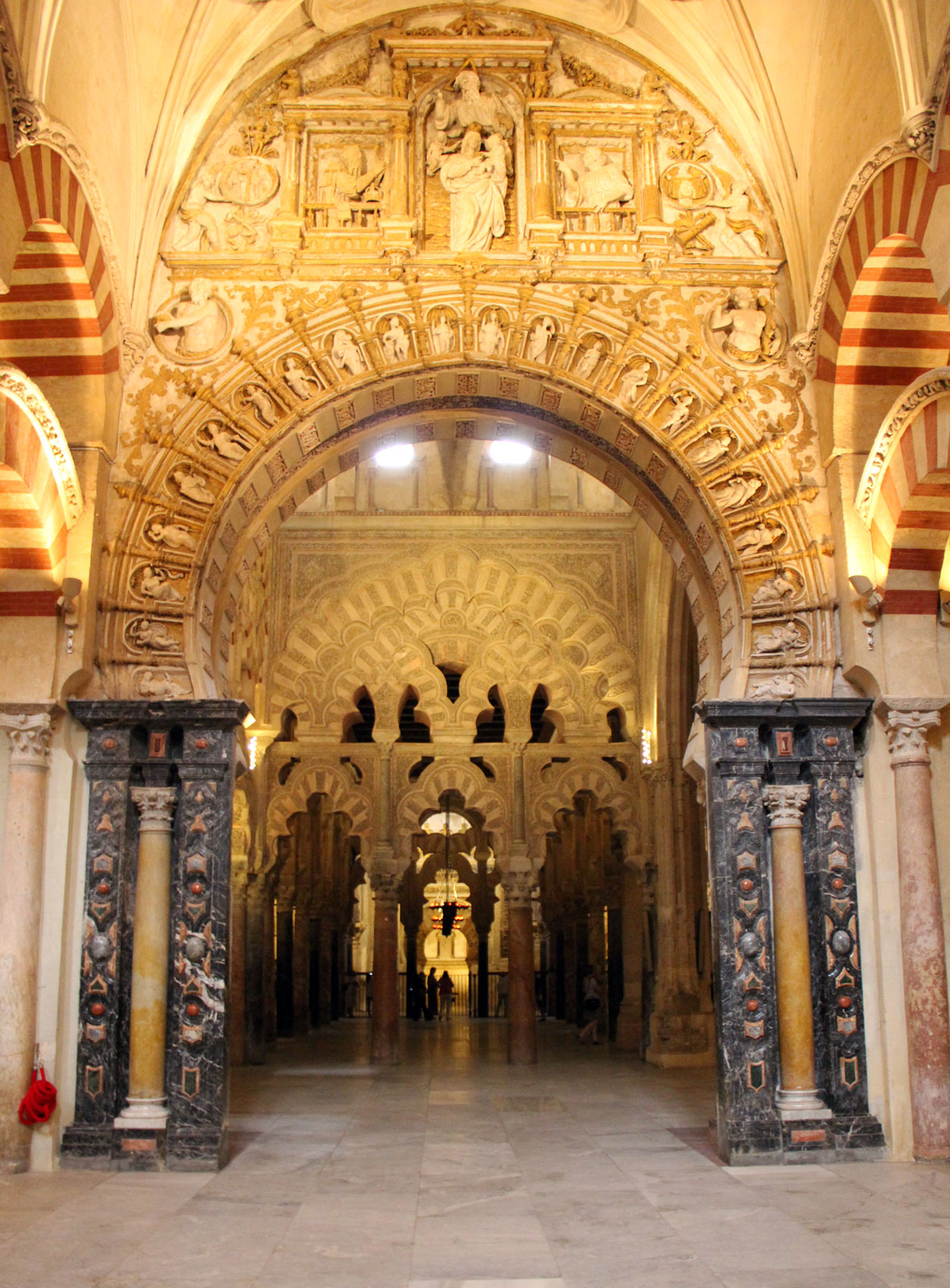 Mezquita